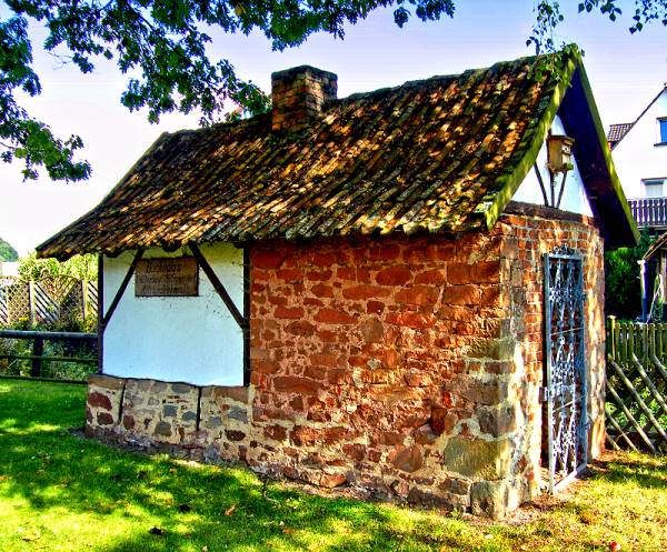 Backhaus - errichtet 1860 - Kulturdenkmal